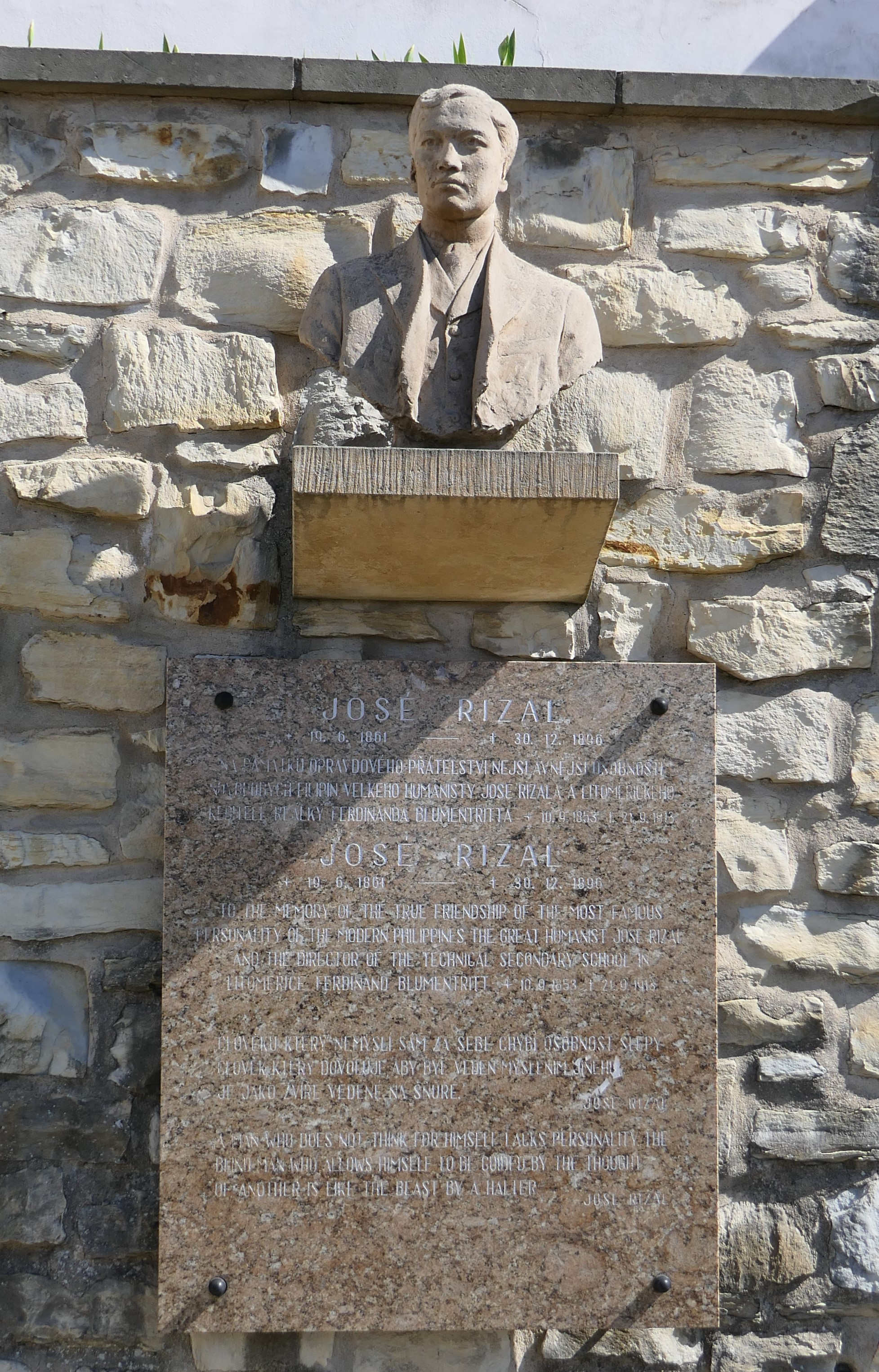 Denkmal für José Rizal in Leitmeritz